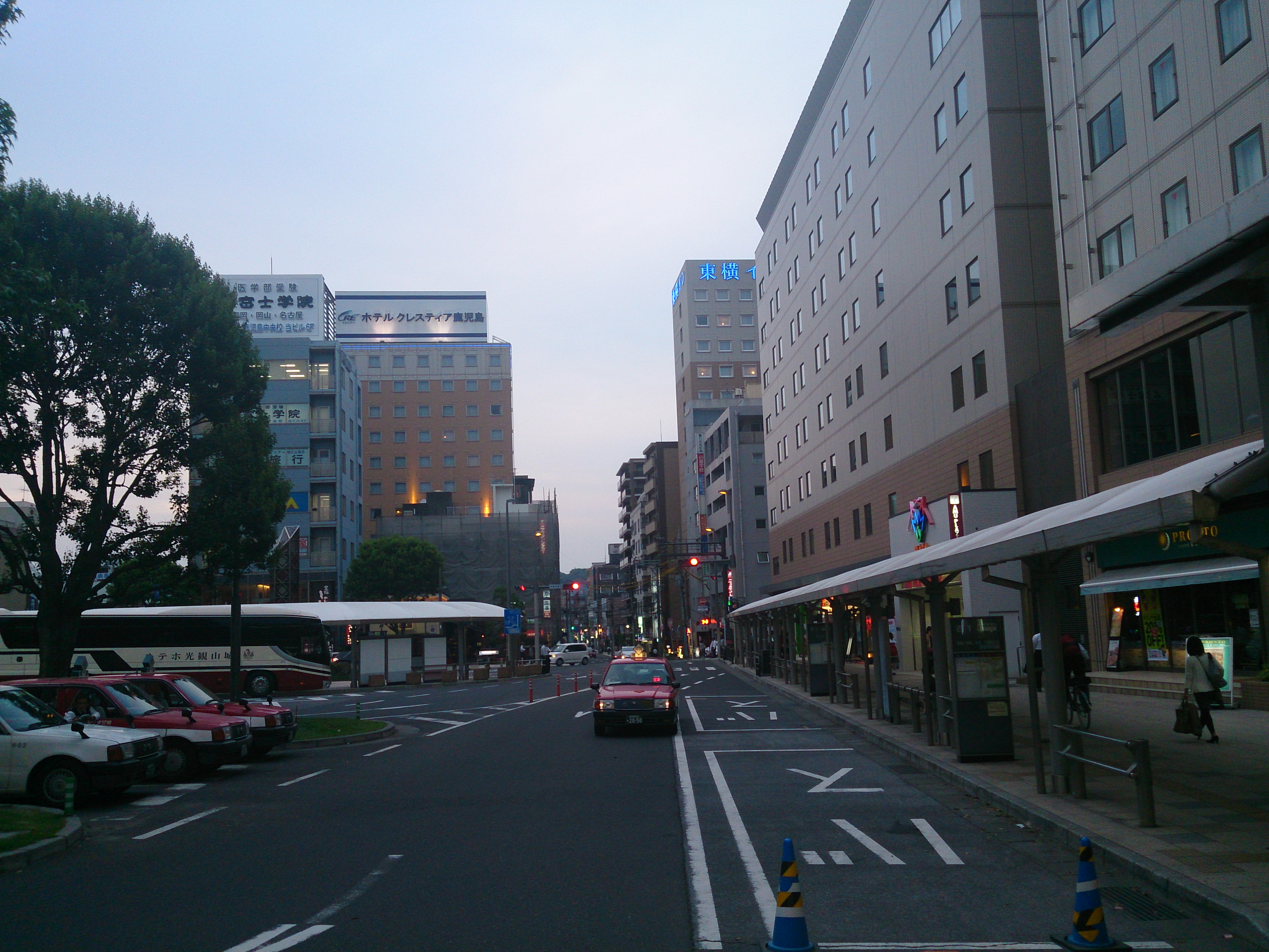 鹿児島中央駅西口バスターミナル（2013年5月）